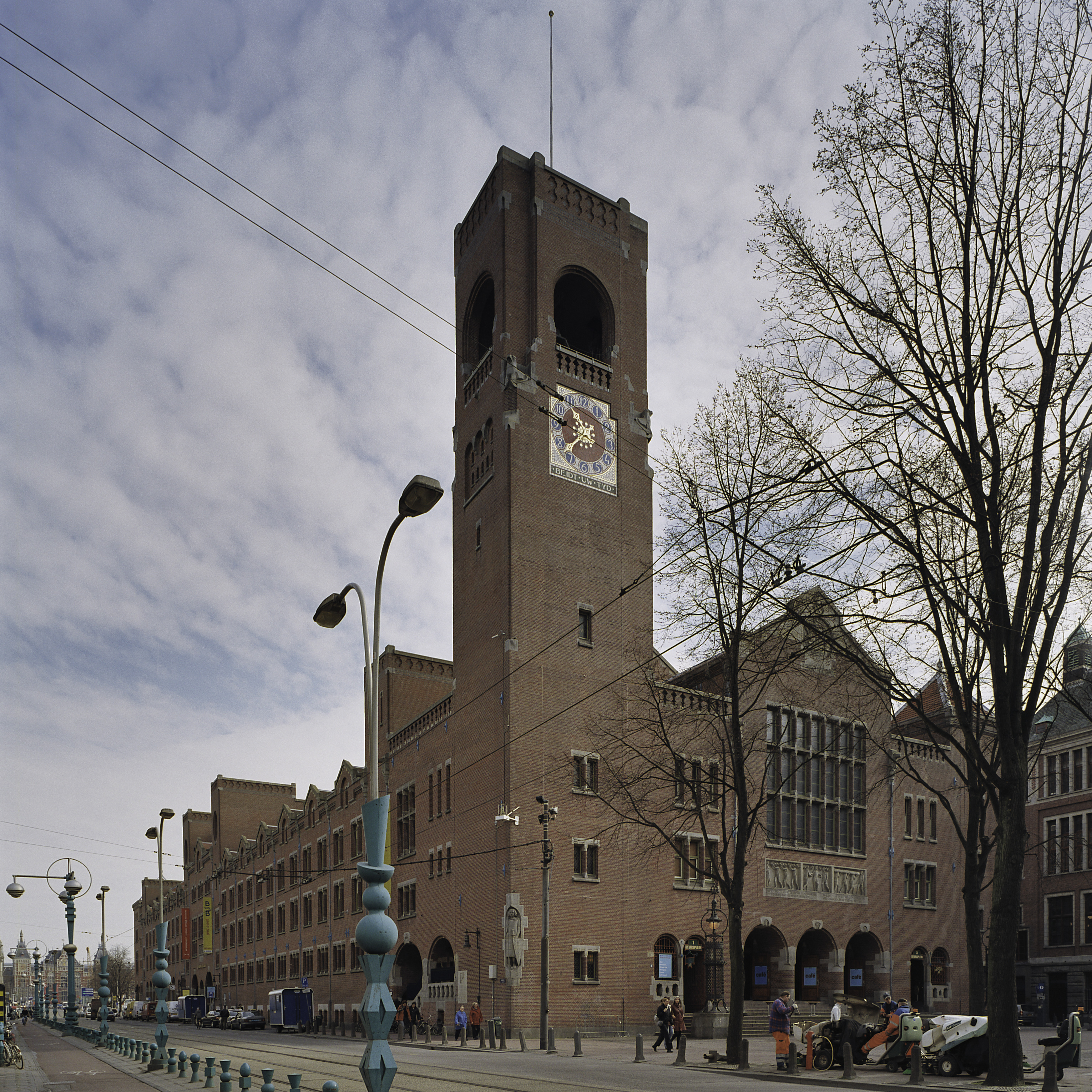 Beurs: Overzicht klokkentoren met uurwerk, aan de Beurspleinzijde de hoofdingang met bordestrap (opmerking: Gefotografeerd voor Monumenten In Nederland Noord-Holland)